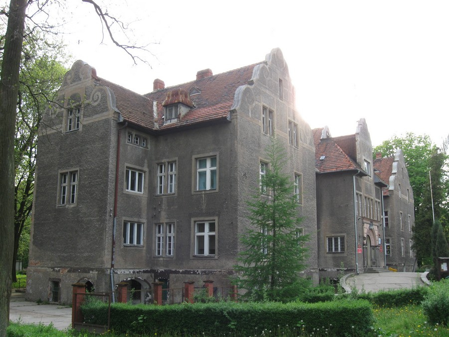 Księginice - pałac, obecnie szkoła (zabytek nr rejestr. A/3000)